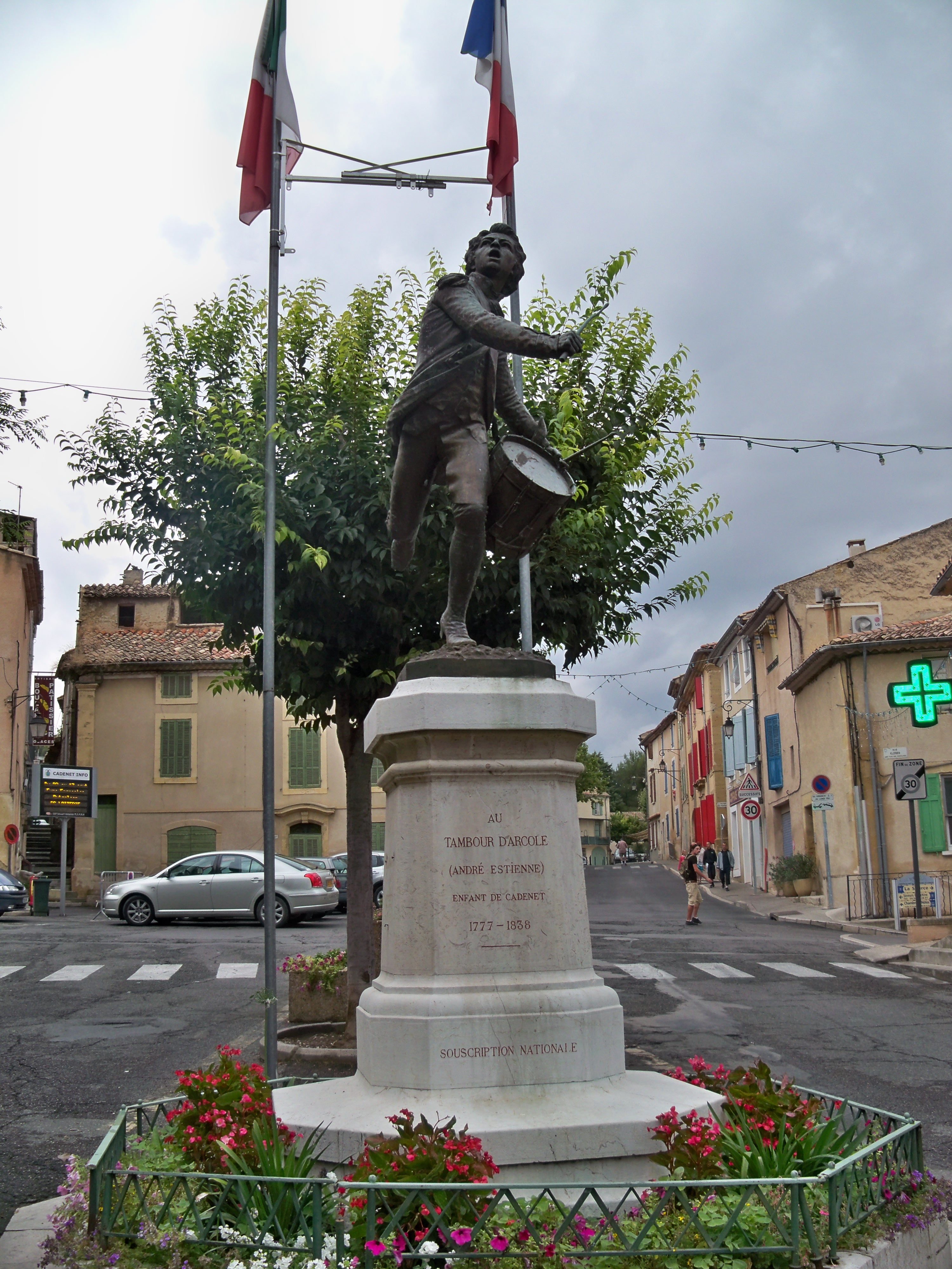 Statue à la mémoire d'André Estienne (1777 - 1838), enfant de Cadenet, Tambour lors de la bataille napoléonienne du Pont d'Arcole en Italie, sur la place du Tambour à Cadenet, Vaucluse, France